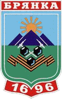 Герб Брянки